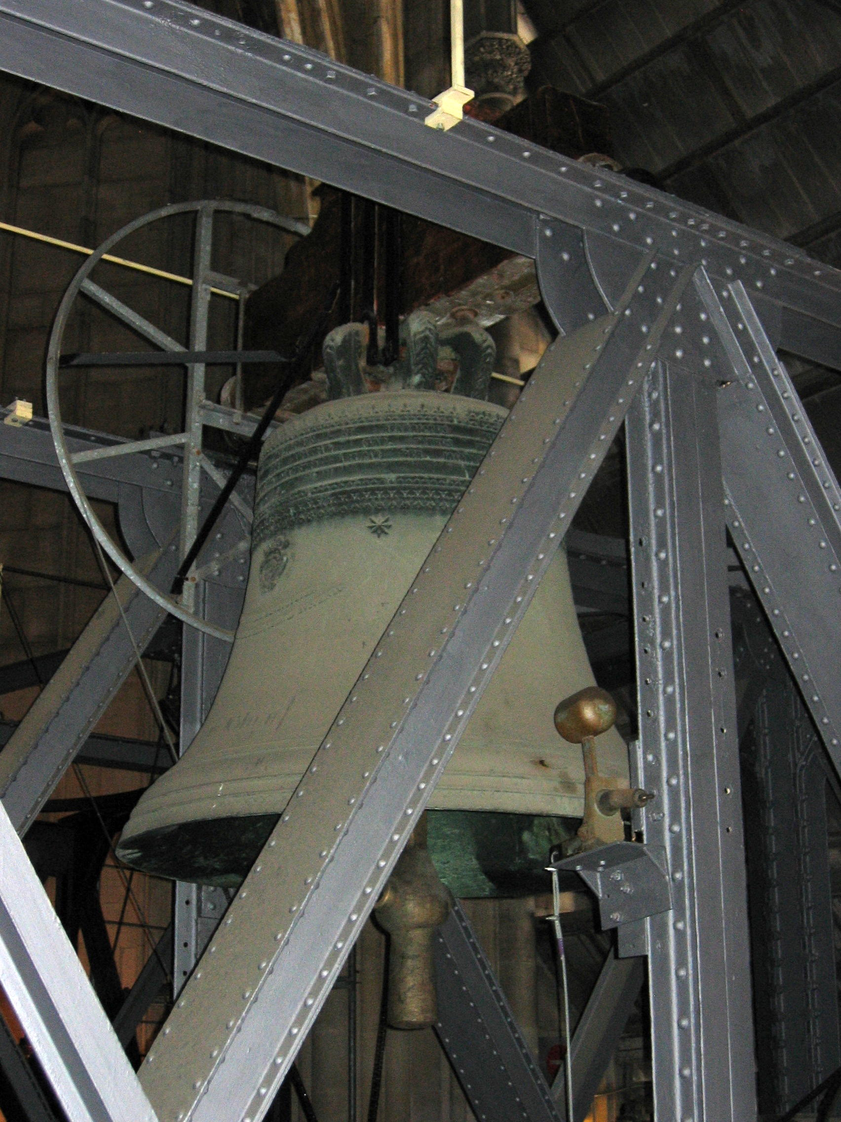 Cologne Cathedral, Dreikönigenglocke